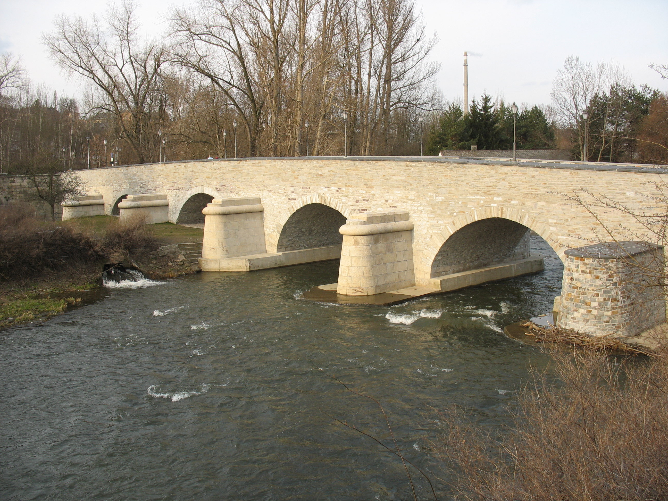 Alte Elsterbrücke in Plauen - Älteste Brücke Sachsens